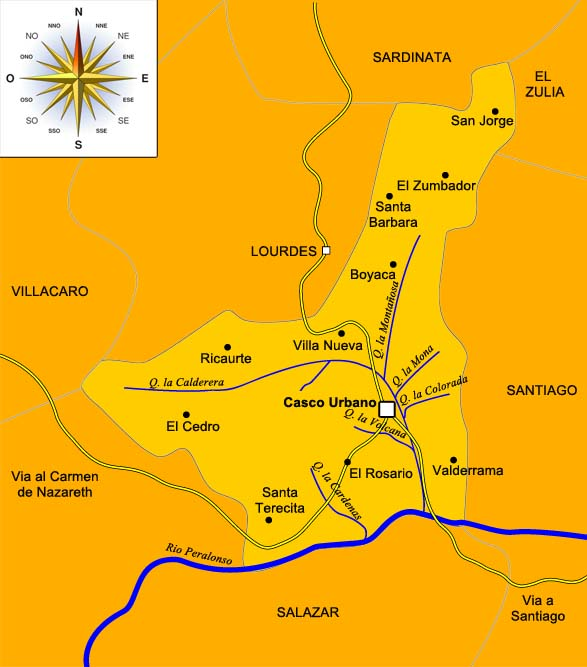 Cartografía del municipio de Gramalote, Norte de Santander, Colombia.